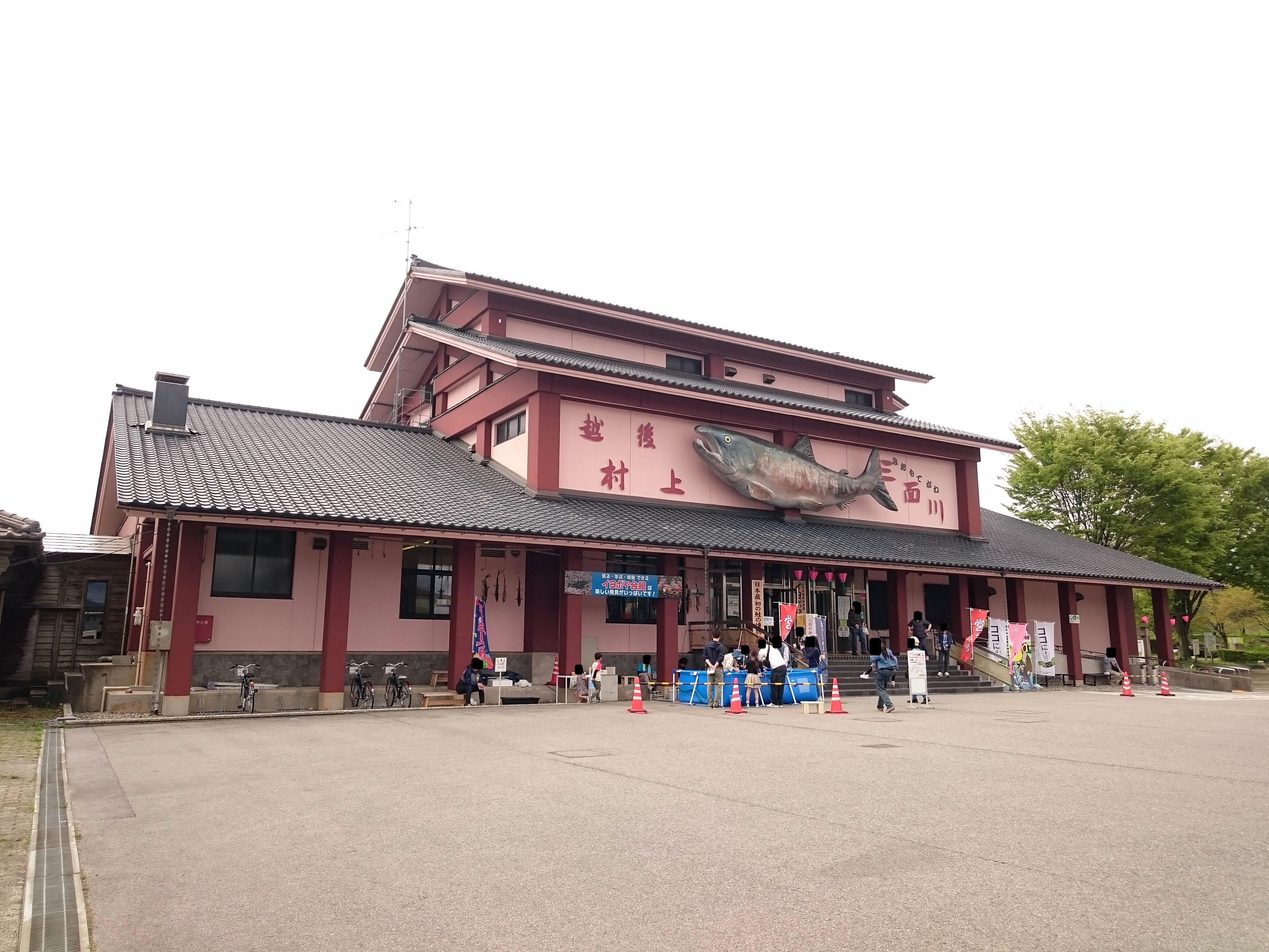 イヨボヤ会館